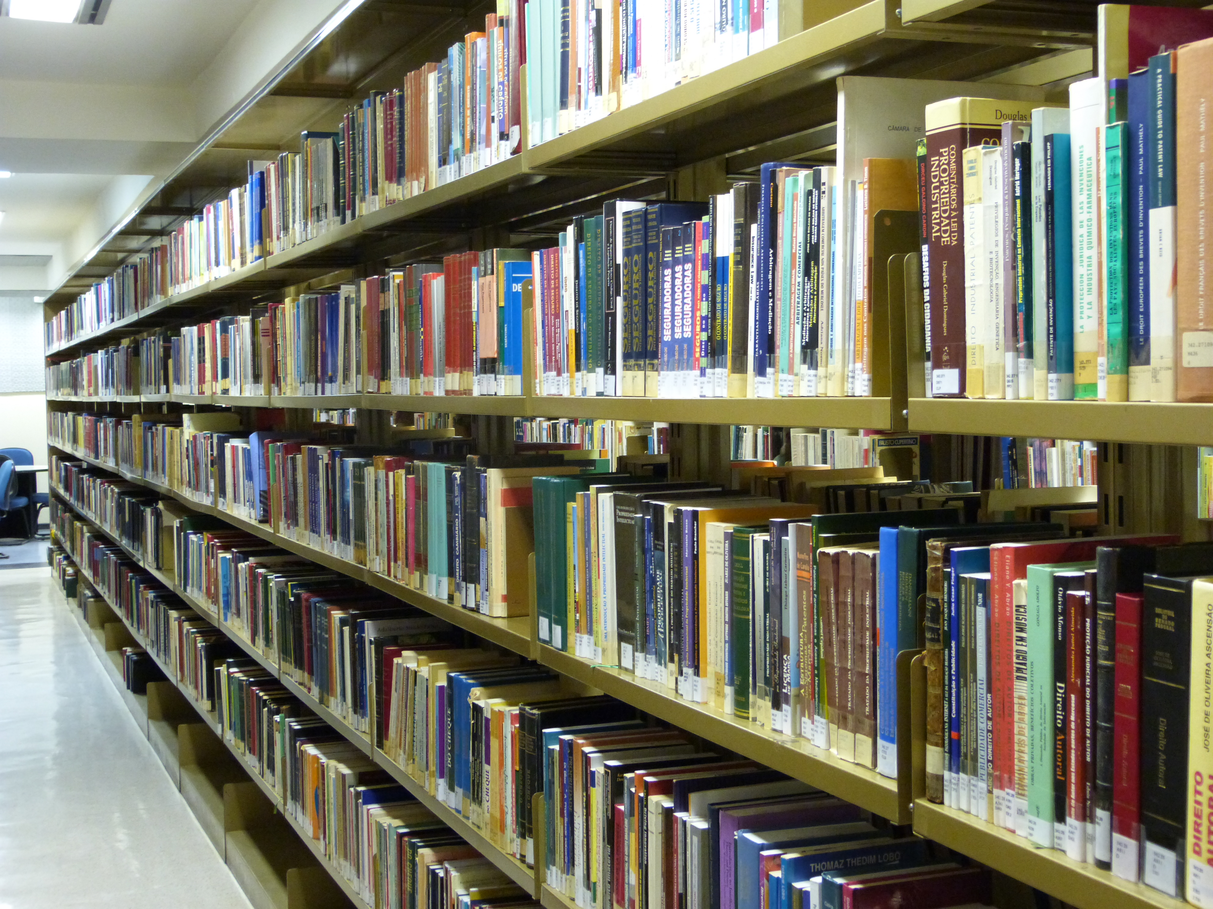 Biblioteca do Senado Federal - Acadêmico Luiz Vianna Filho Brasília - DF / Brasil